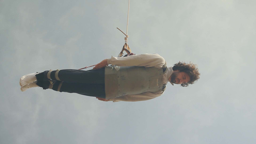 Video Art